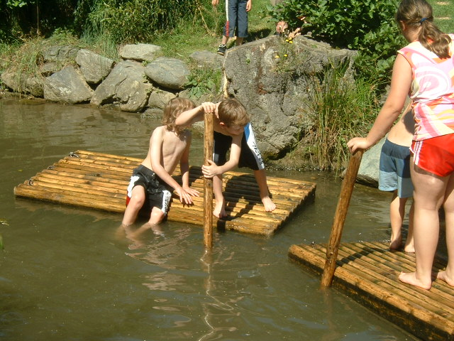 Floßfahren im Freizeitpark Lochmühle bei Wehrheim in Hessen